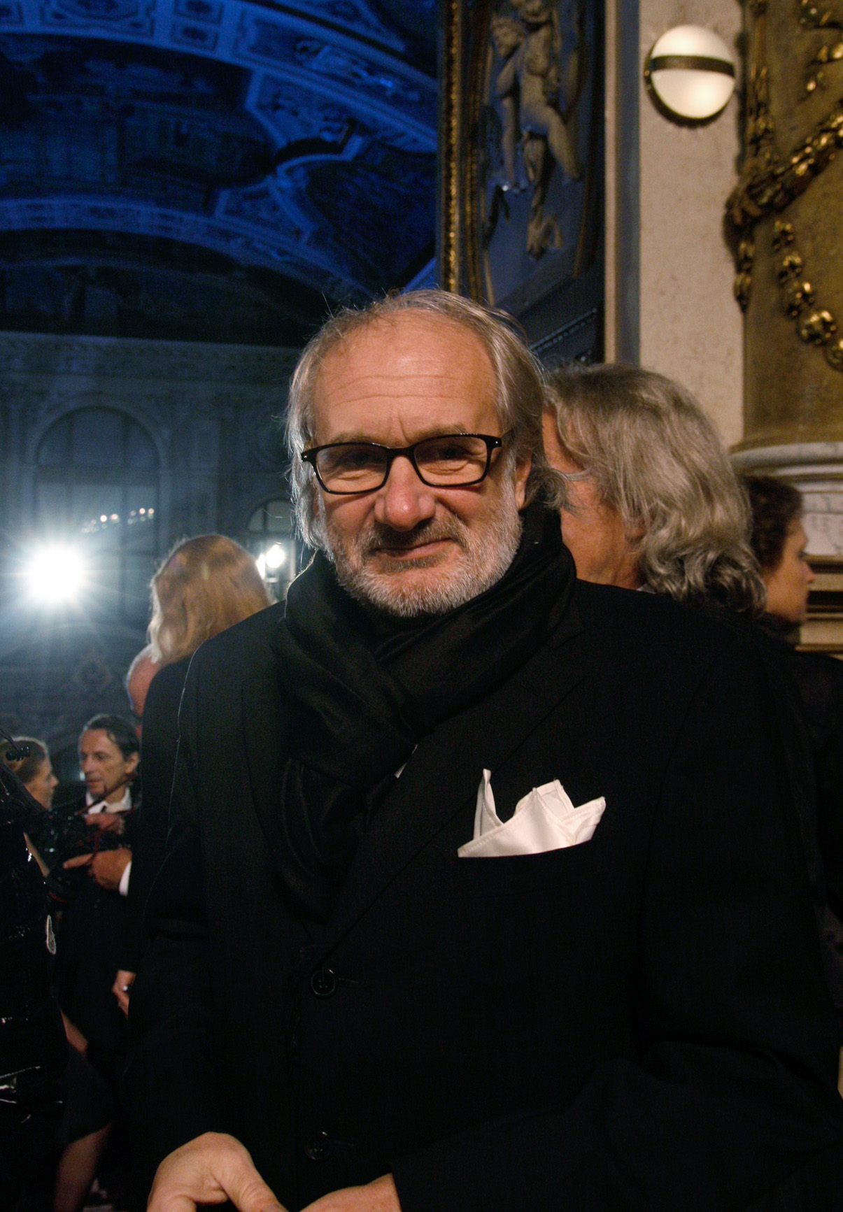 Michael Schottenberg zu Gast bei der Verleihung des Nestroy-Theaterpreises 2010 im Burgtheater in Wien.